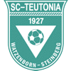 Logo von Teutonia Watzenborn-Steinberg